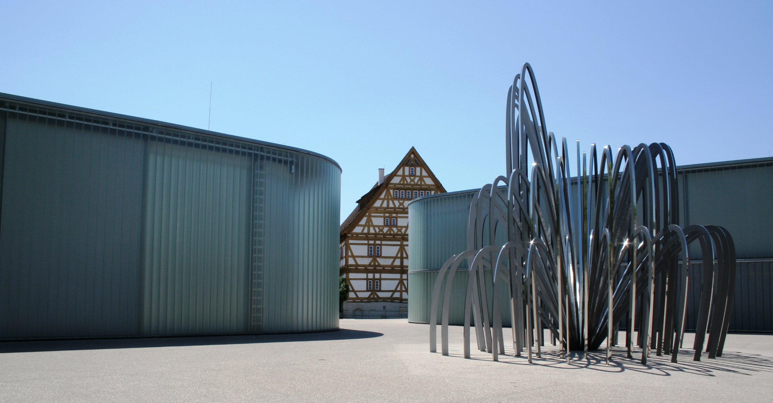 Kunstensemble an der Rems: Galerie Stihl Waiblingen, Stadtmuseum und Kunstschule Unteres Remstal mit "Pavillon für Waiblingen" von Olafur Eliasson